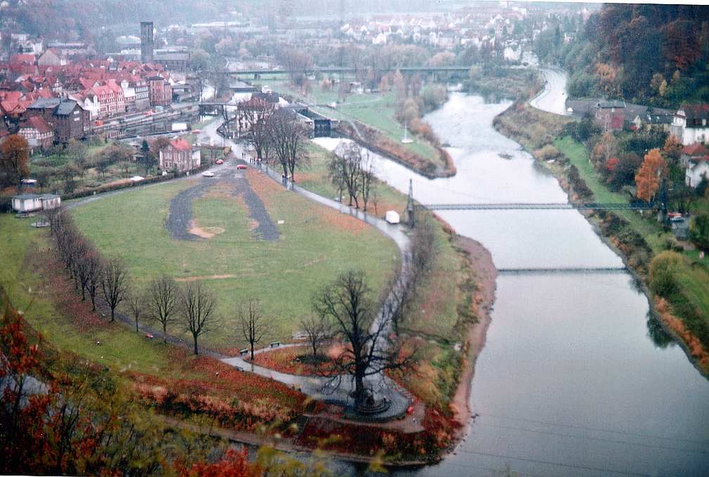 Tanzwerder mit Weserbeginn in Hann. Münden